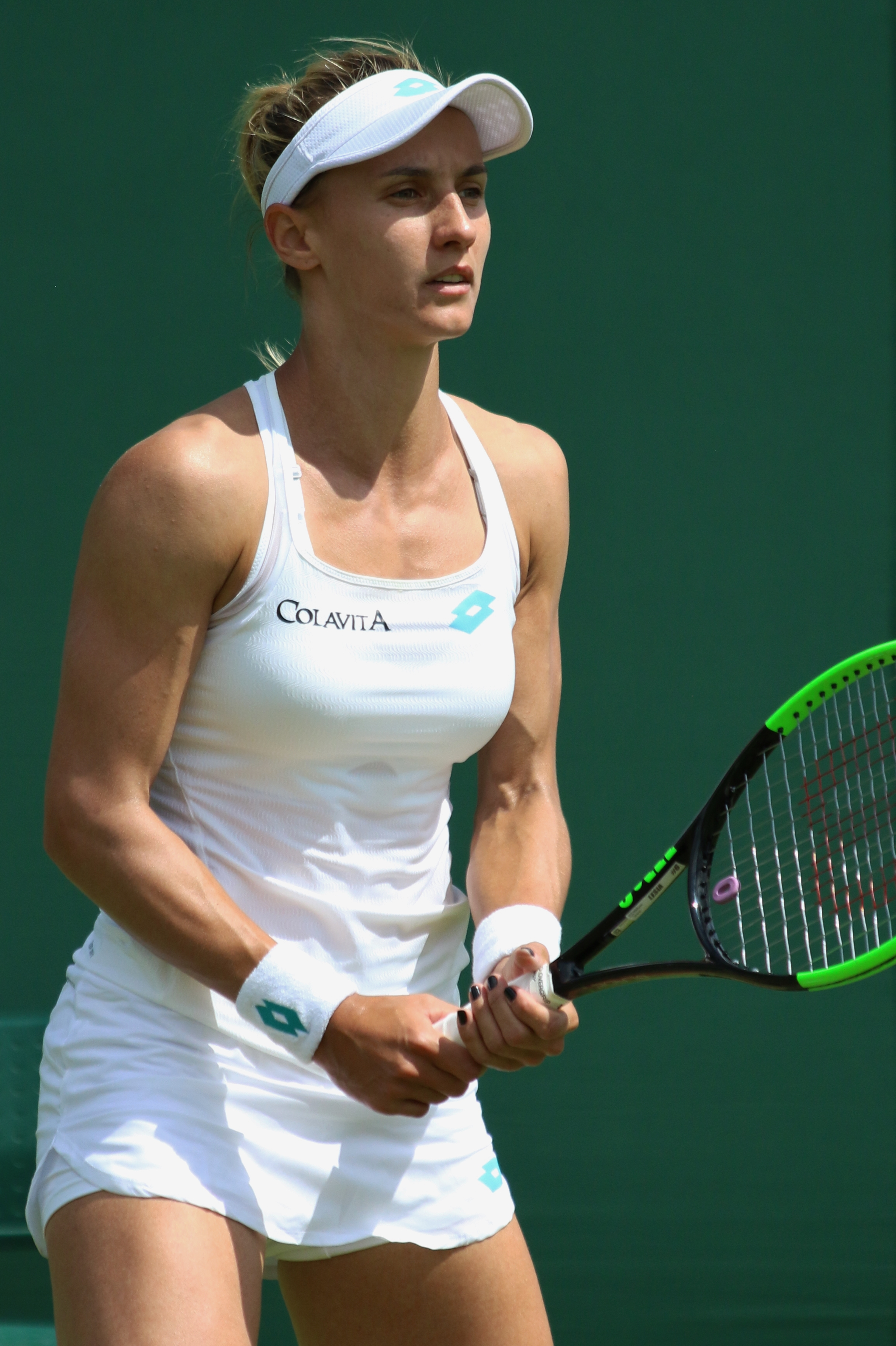 Tsurenko WM19 (7)